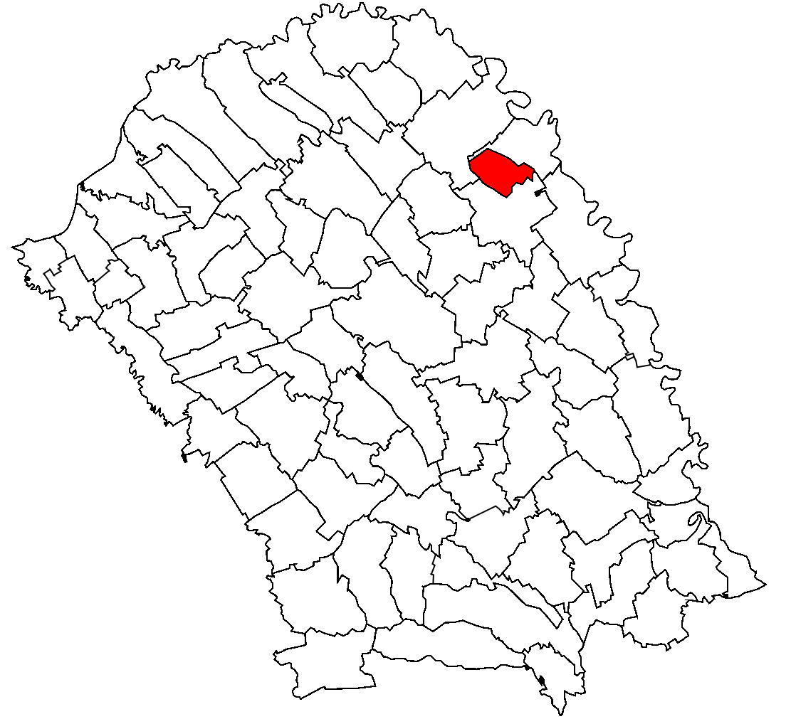 Categorie:Hărţi ale judeţului Botoşani